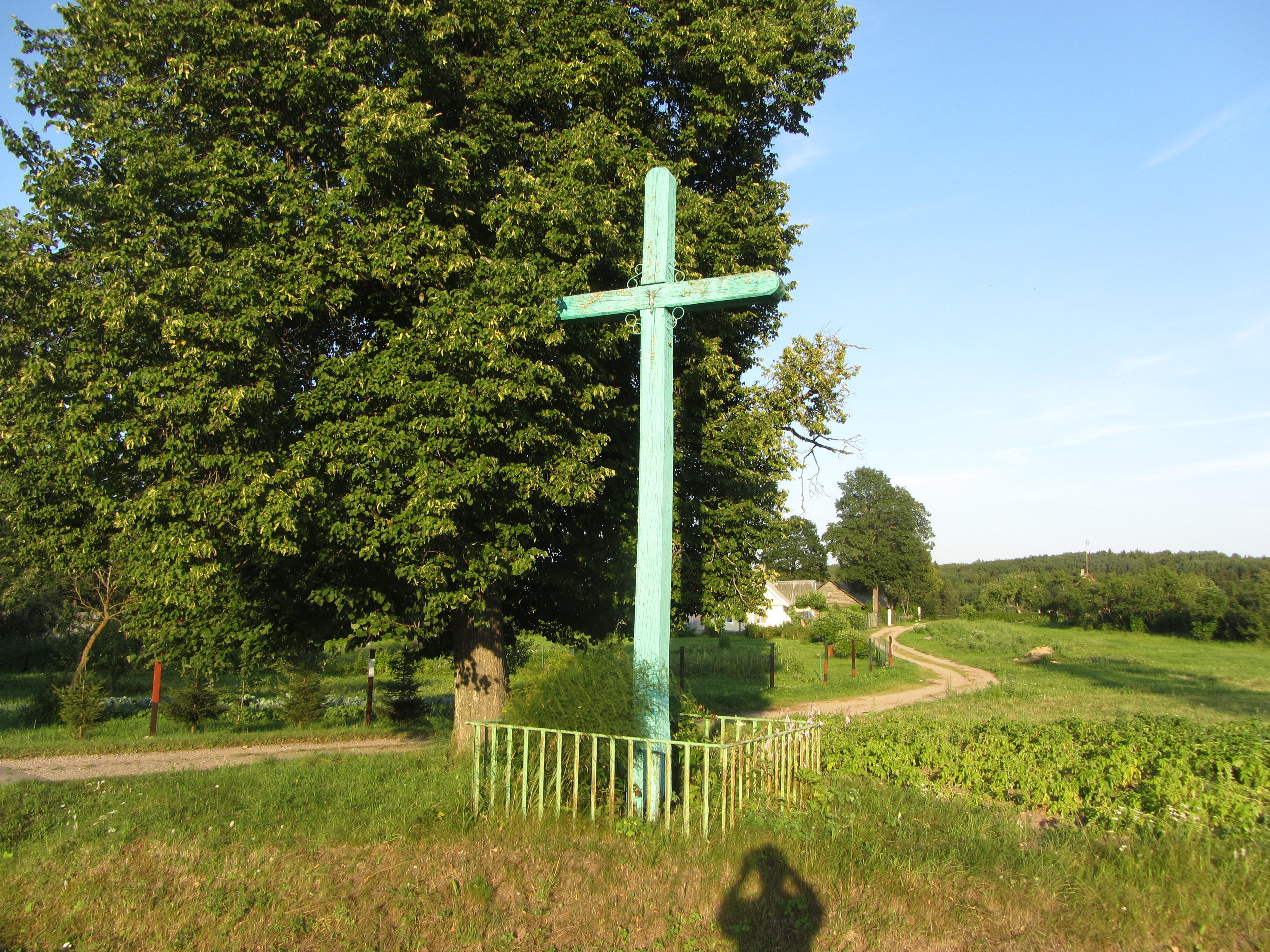 Senasis Daugėliškis 30291, Lithuania